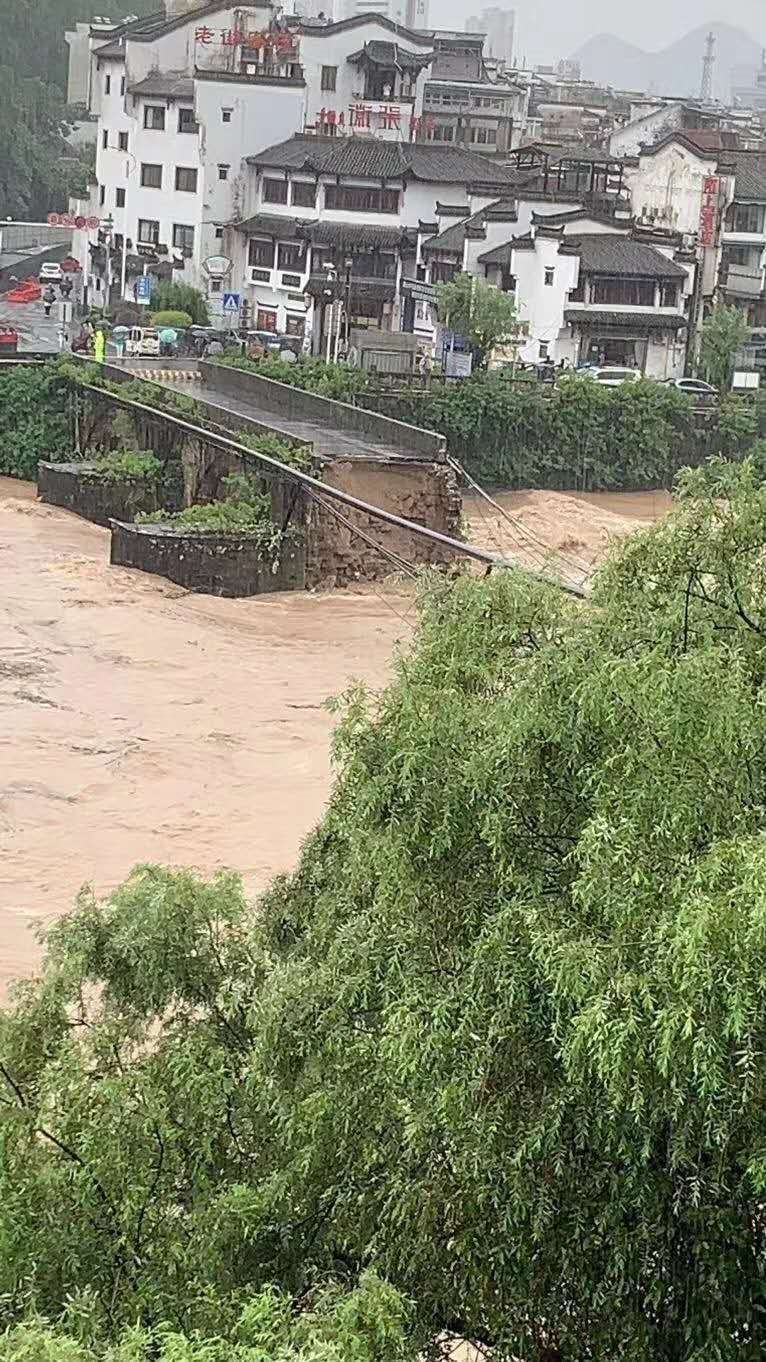 中文（中国大陆）: 屯溪镇海桥（老大桥）在2020年7月7日被洪水冲毁